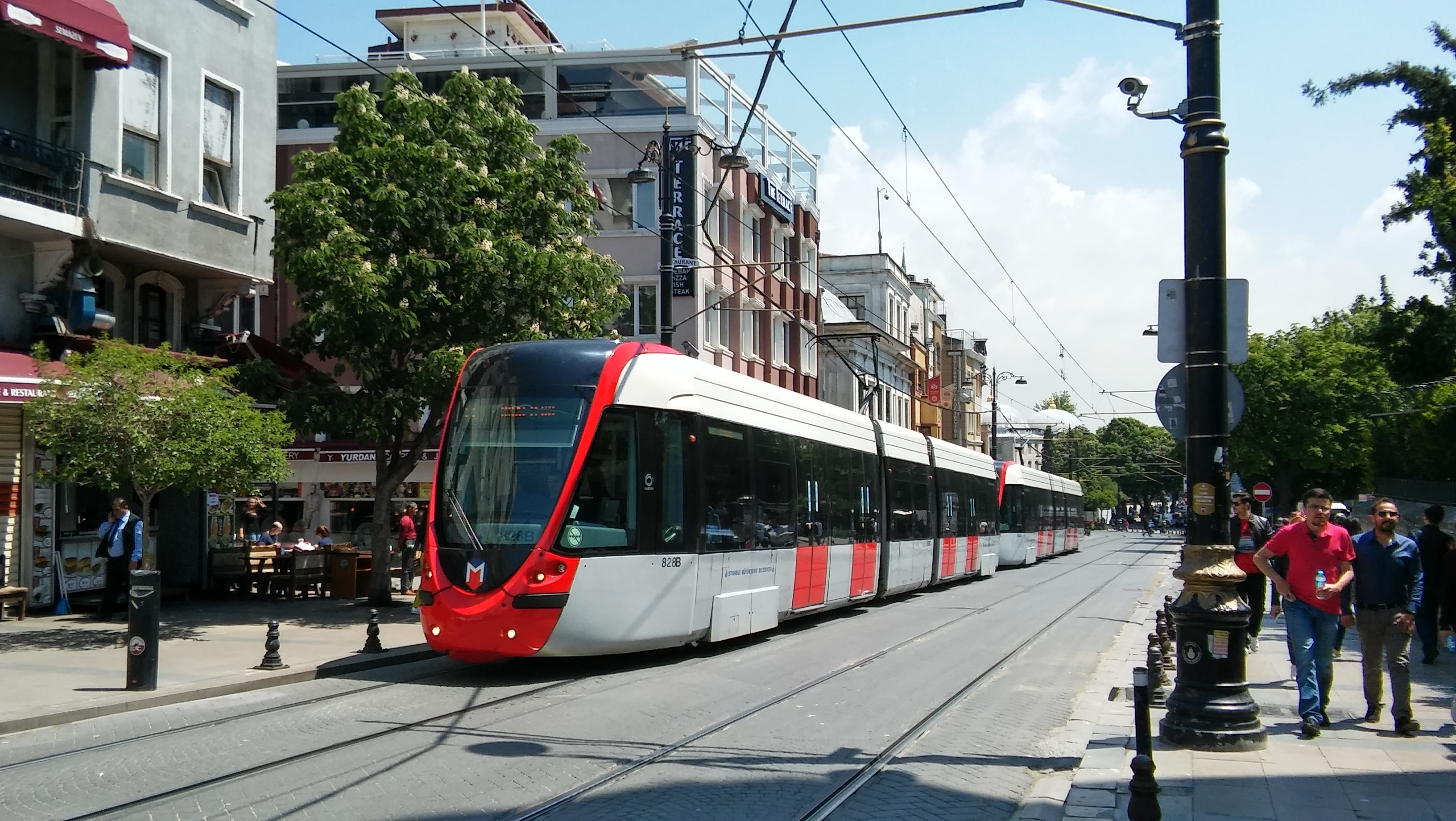 Rame de tramway à Istanbul